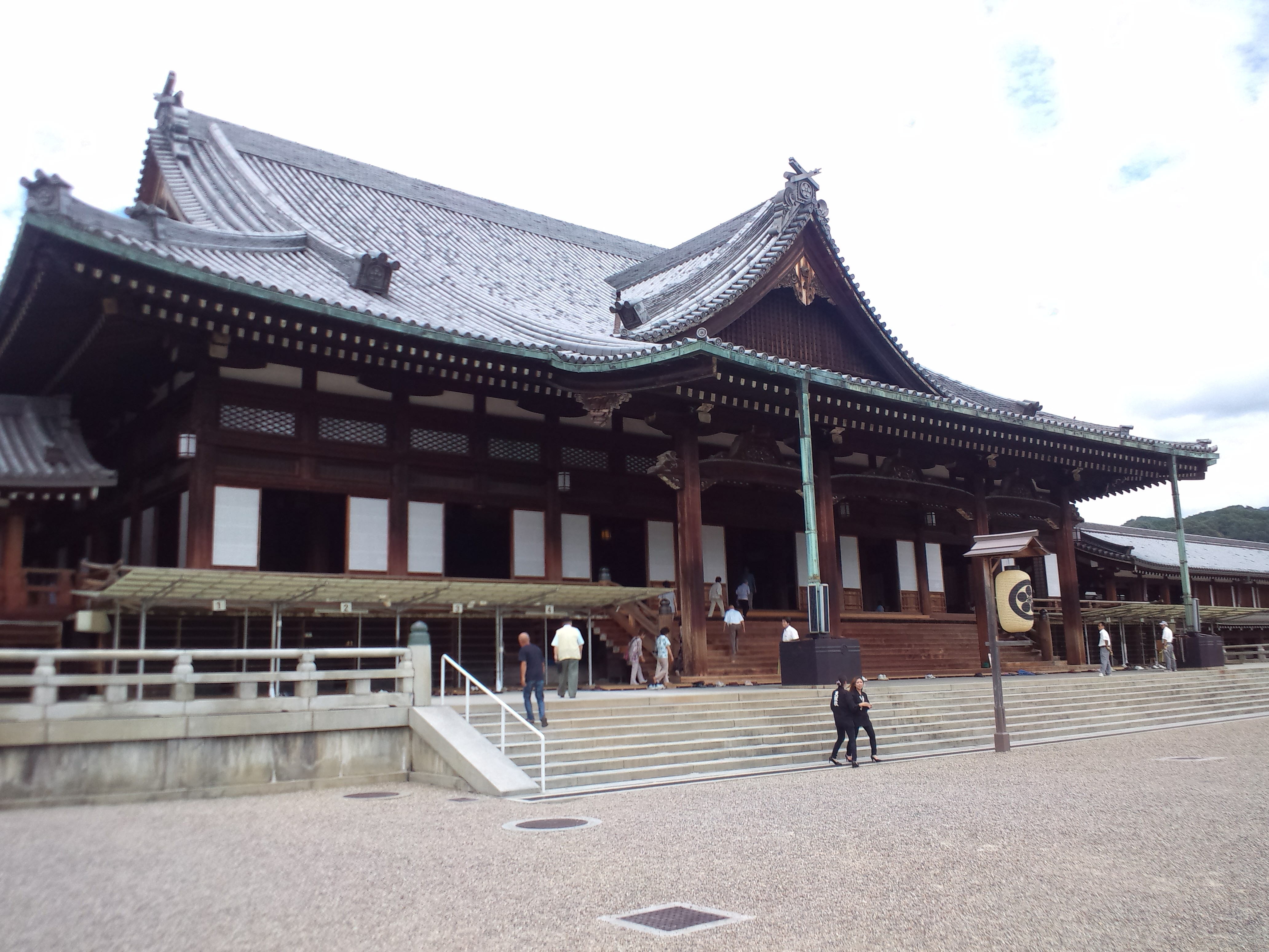 天理教 本部